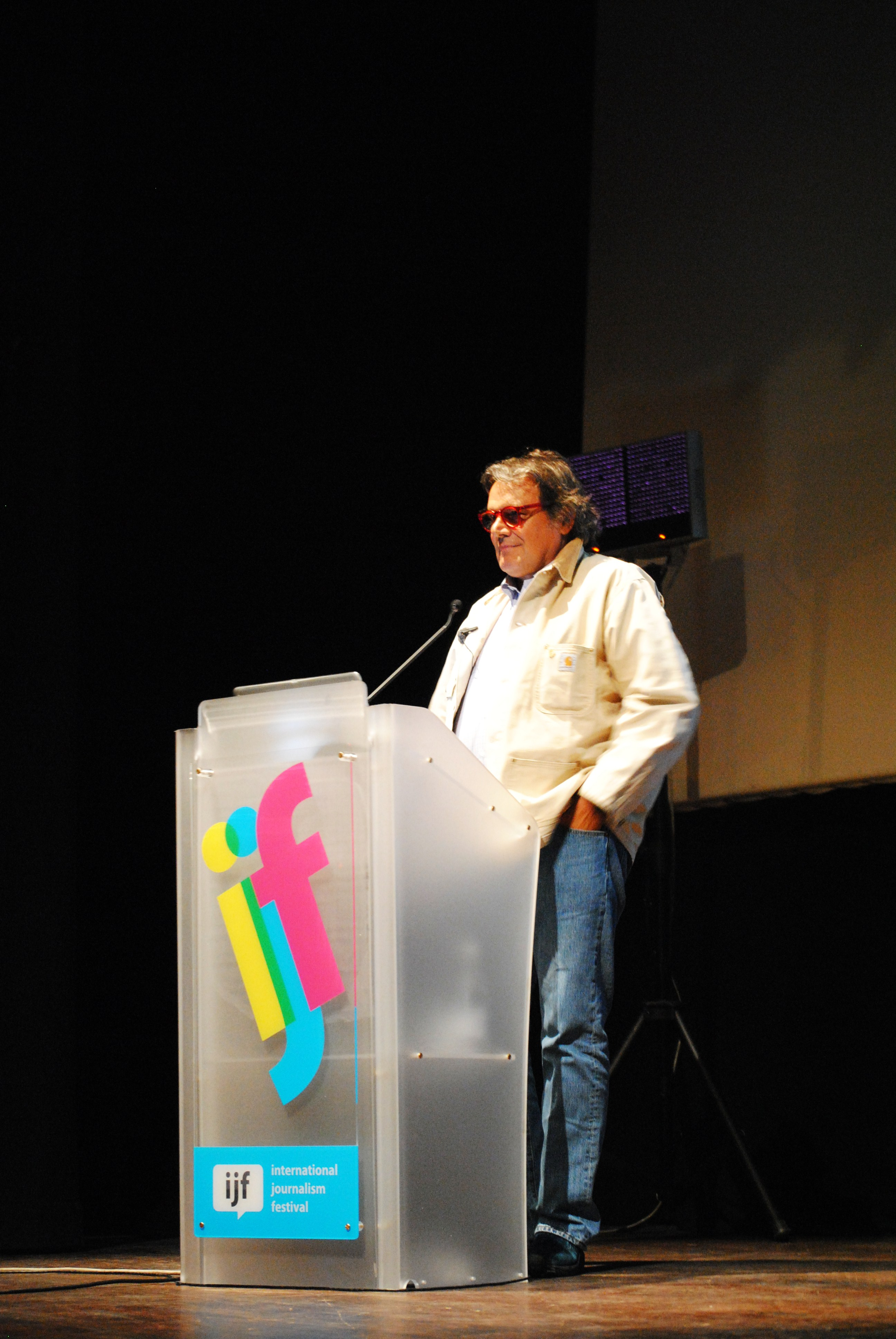 Oliviero Toscani @cecilia